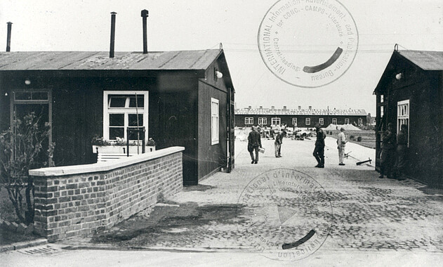 Lối vào khu nhà của tù nhân. Bên trái và bên phải là doanh trại bằng gỗ dành cho sĩ quan chỉ huy khu giam giữ tù nhân.